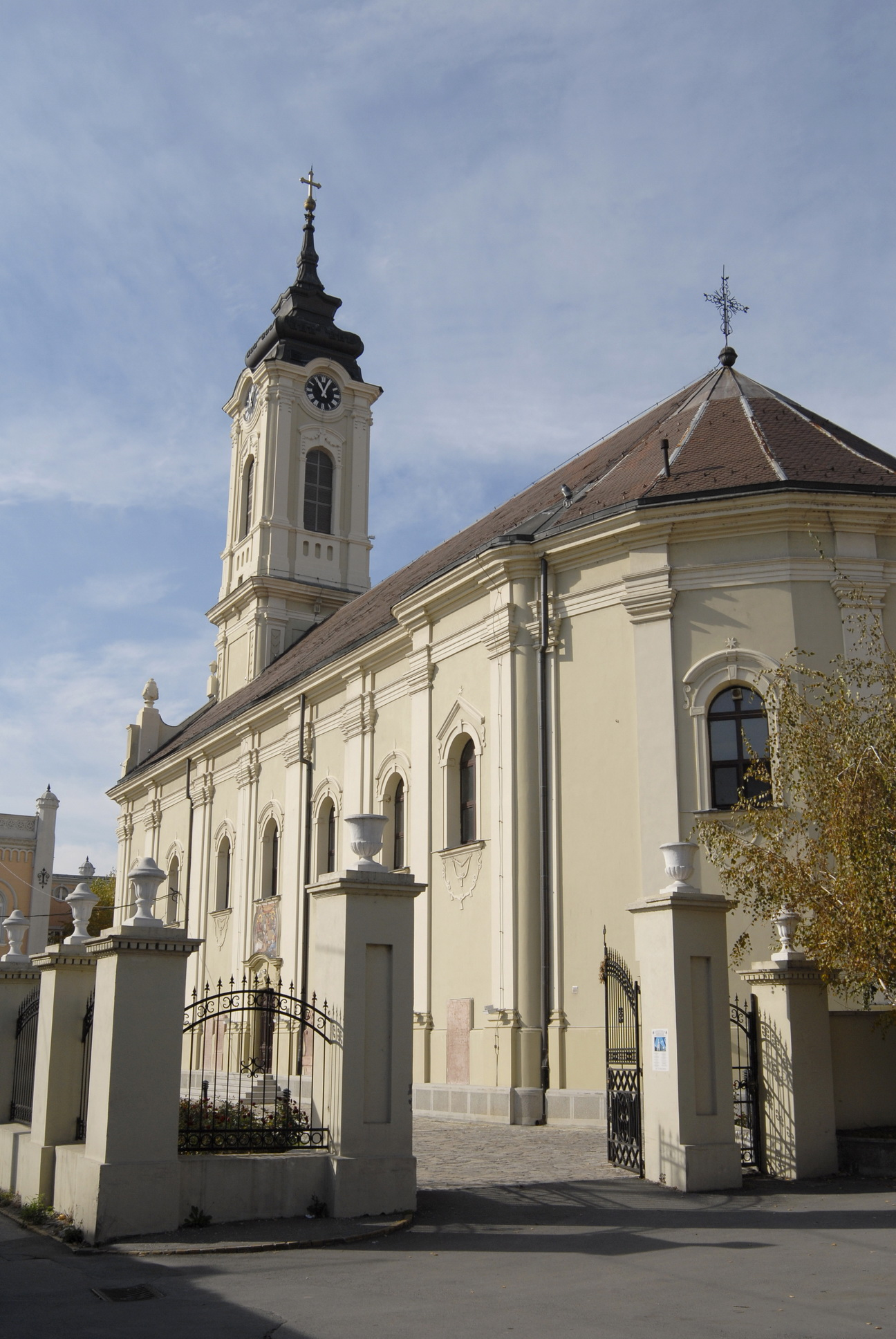 Autor by Snežana Negovanović